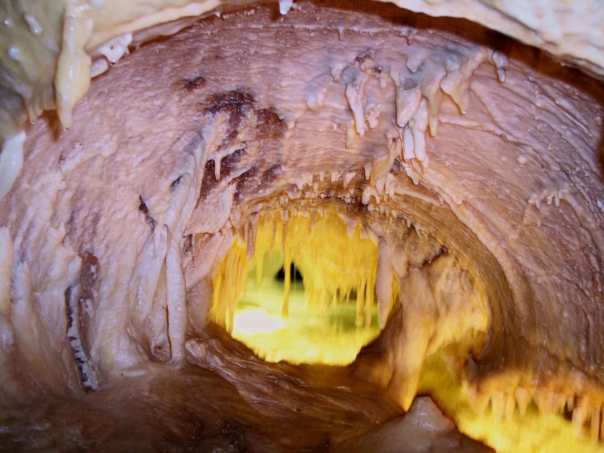 See in einer Höhle, Obir-Tropfsteinhöhle in Kärnten